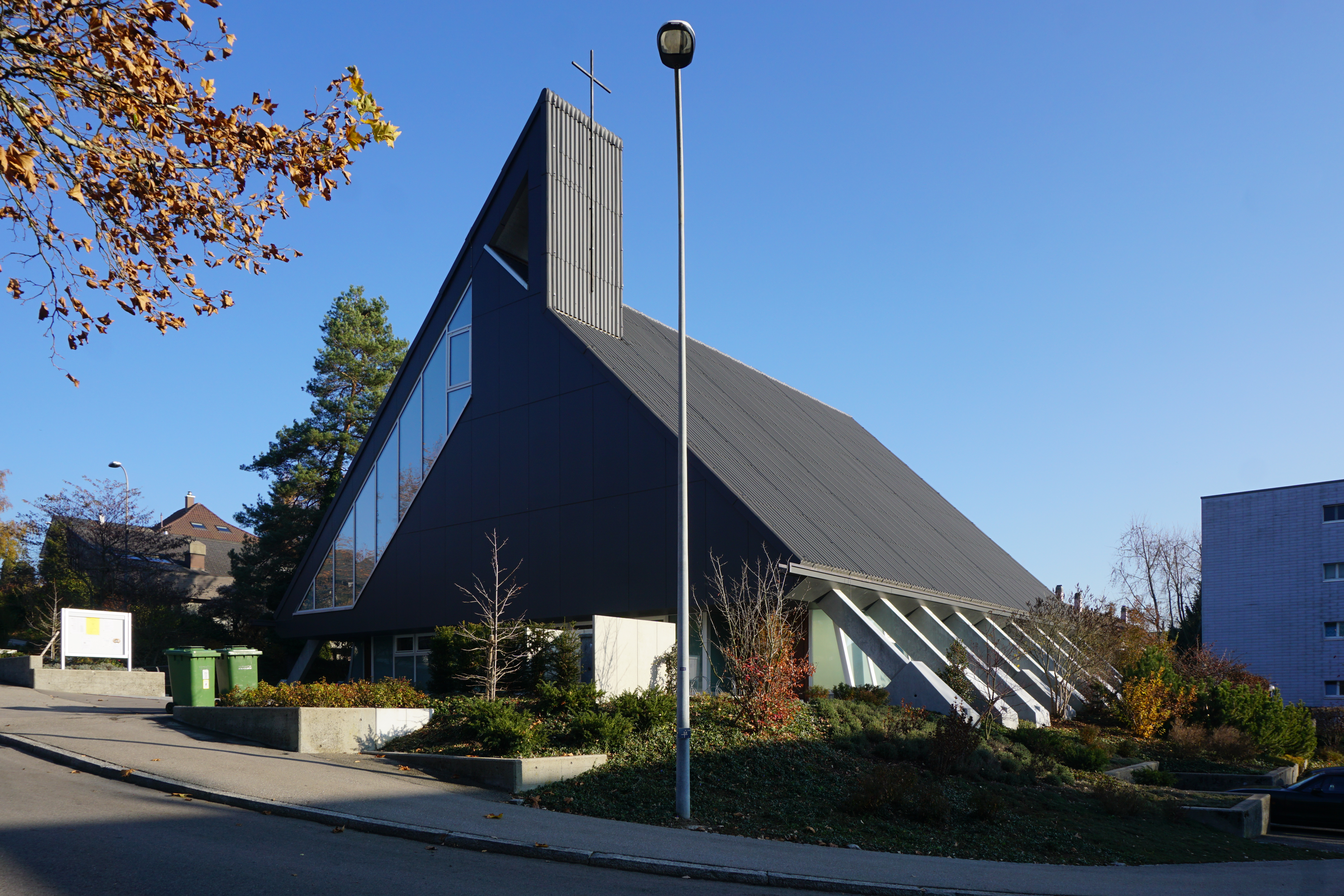 Johanneskirche von West